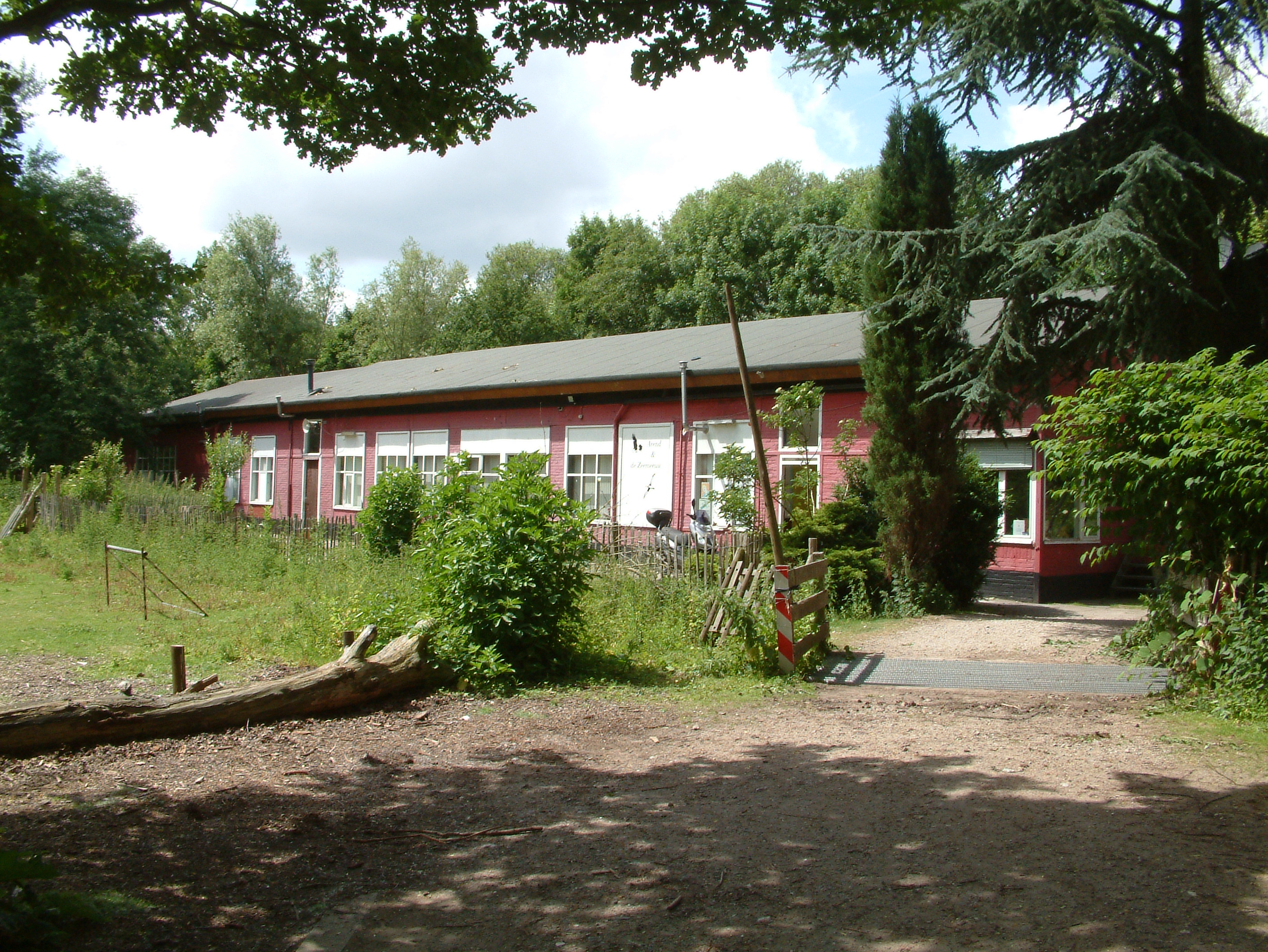 Het clubhuis van de Arend en de Zeemeeuw op het eiland Van Brienenoord in IJsselmonde.